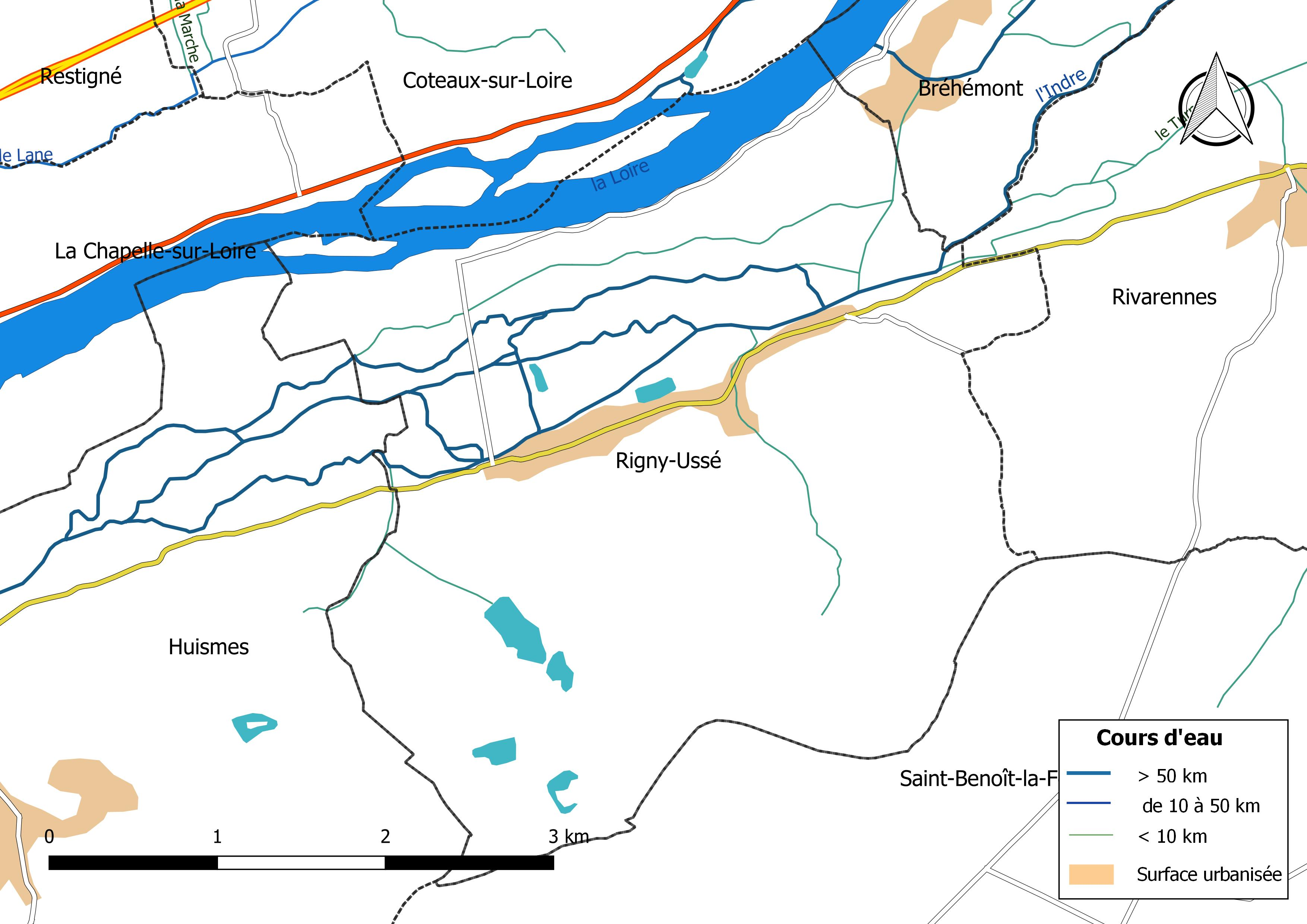 Carte du réseau hydrographique de la commune de Rigny-Ussé (France).